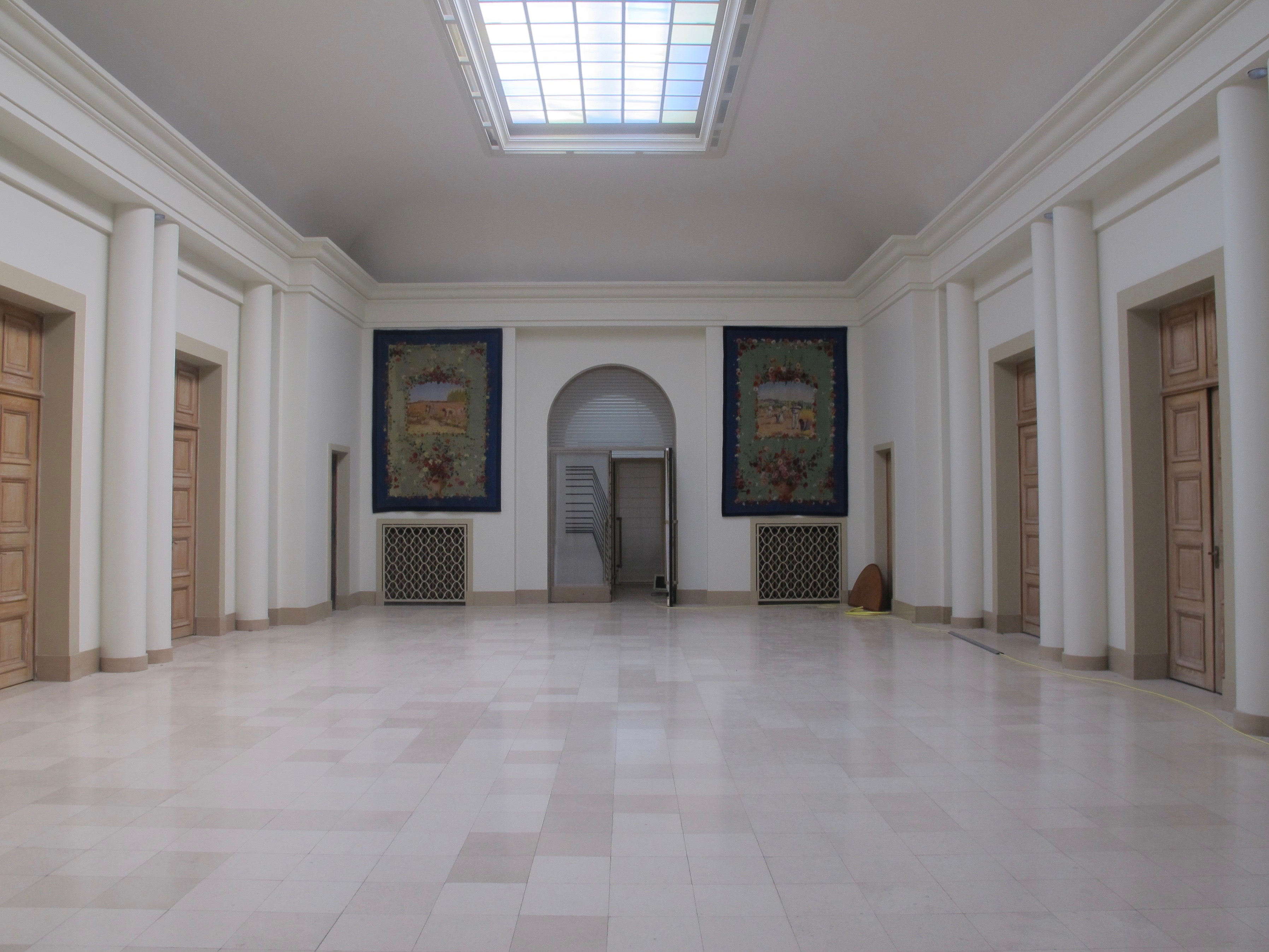 Palais de l'Alma (Paris, 7e). Aile où siégeait le Conseil supérieur de la magistrature.